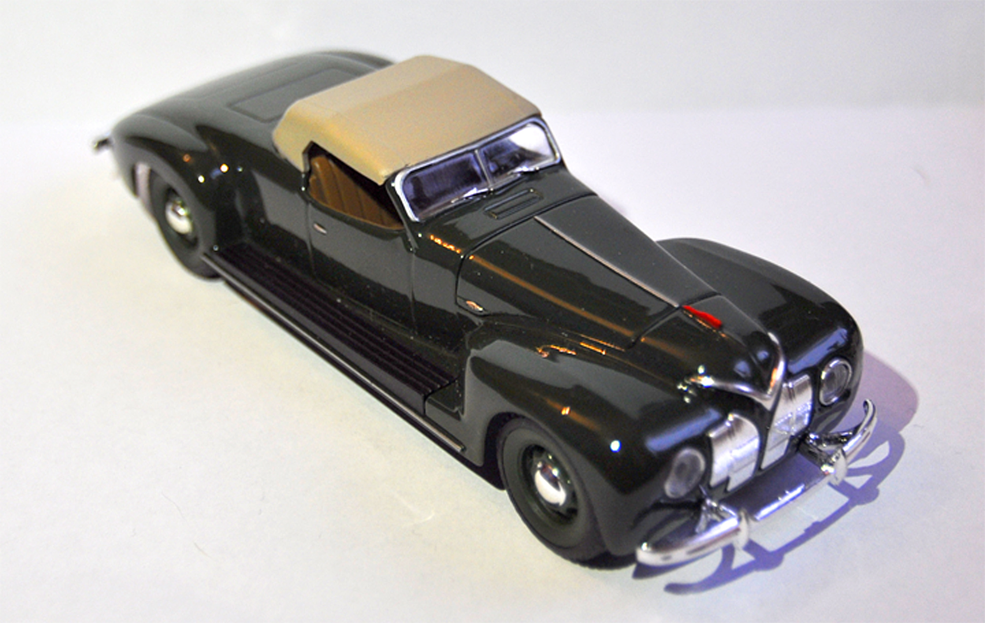 ЗИС-101А Спорт